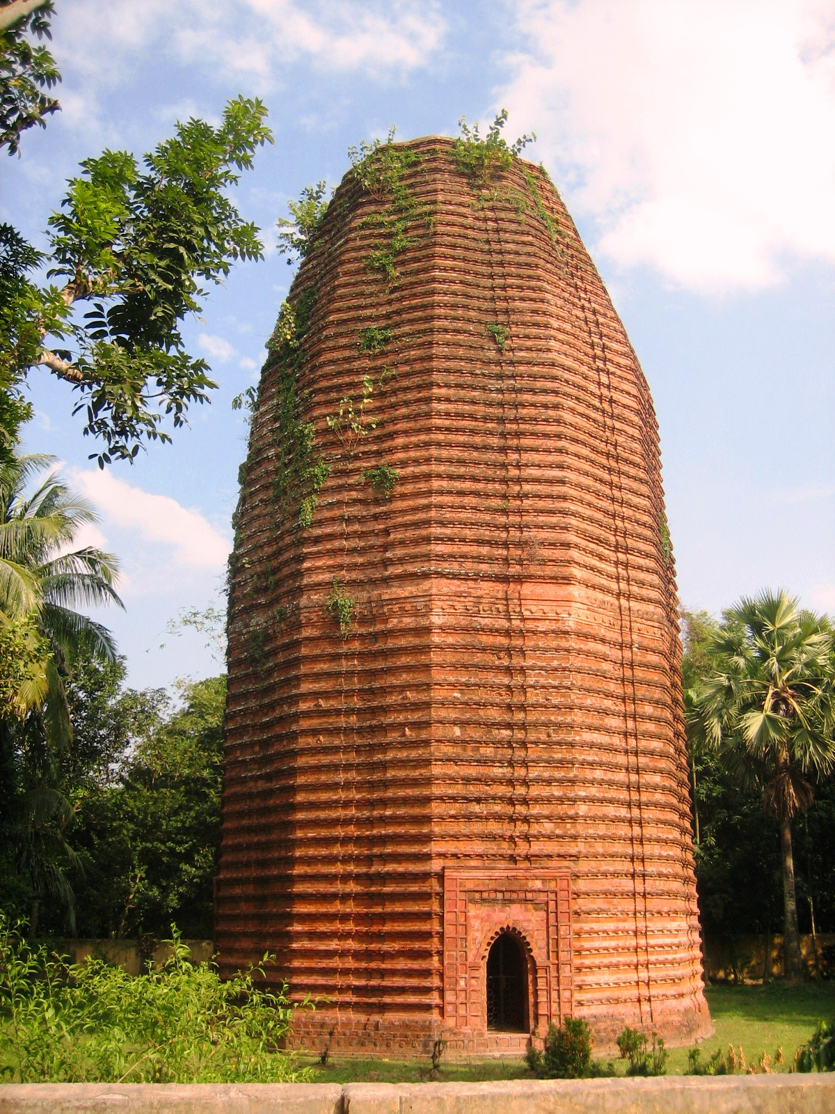 মথুরাপুর দেউল